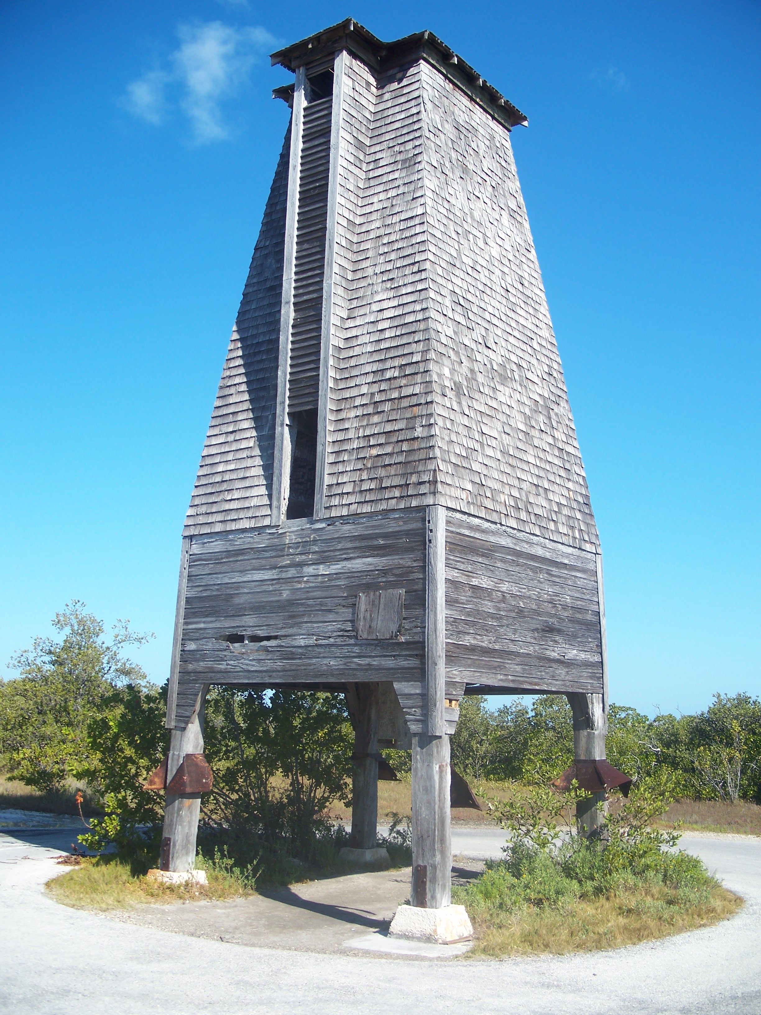 Sugarloaf Key: Sugarloaf Key Bat Tower